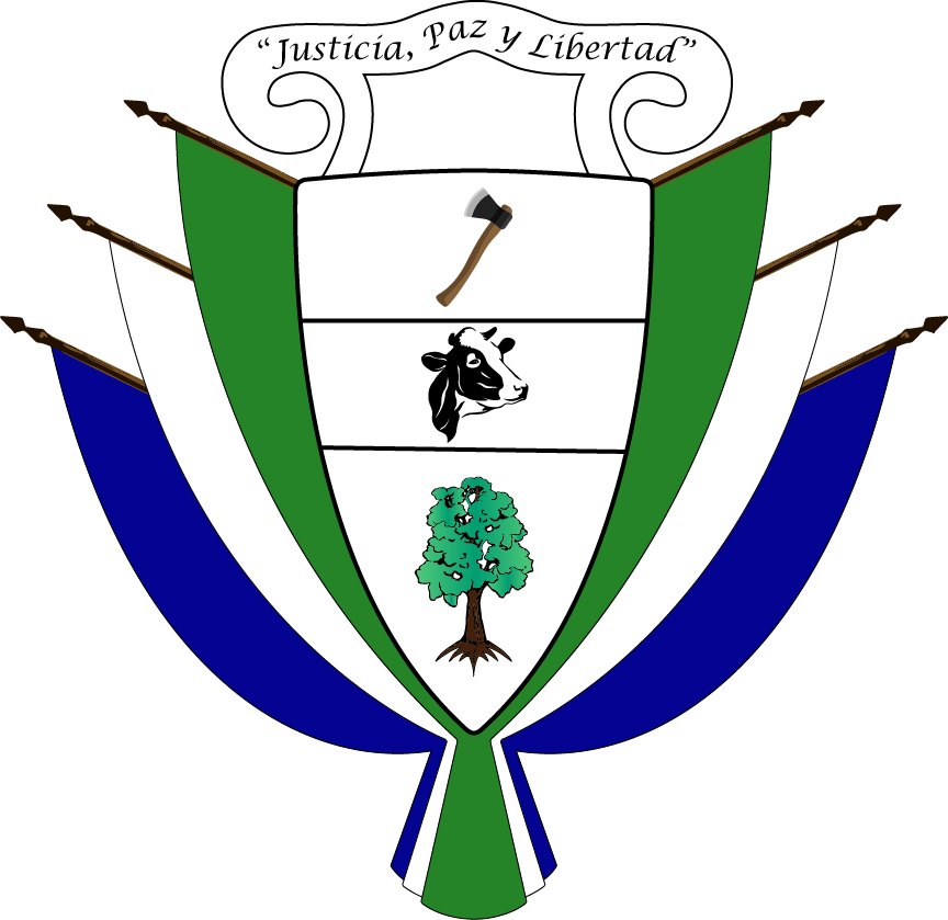 Escudo